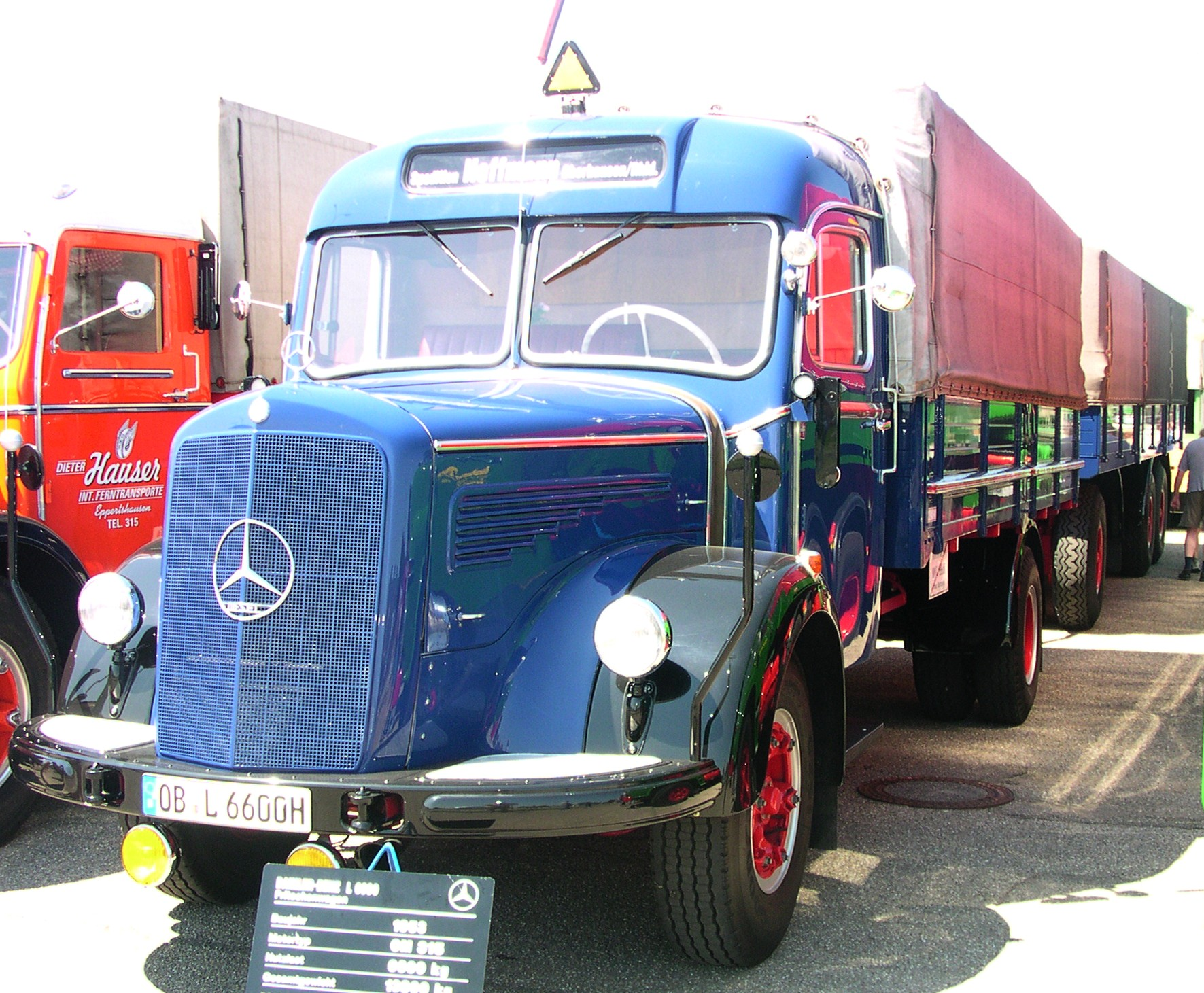 Mercedes L 6600, Baujahr 1953, 107 kW (145 PS), 8276 ccm Hubraum in Wörth am Rhein beim Oldtimer-Treffen bei Daimler-Chrysler